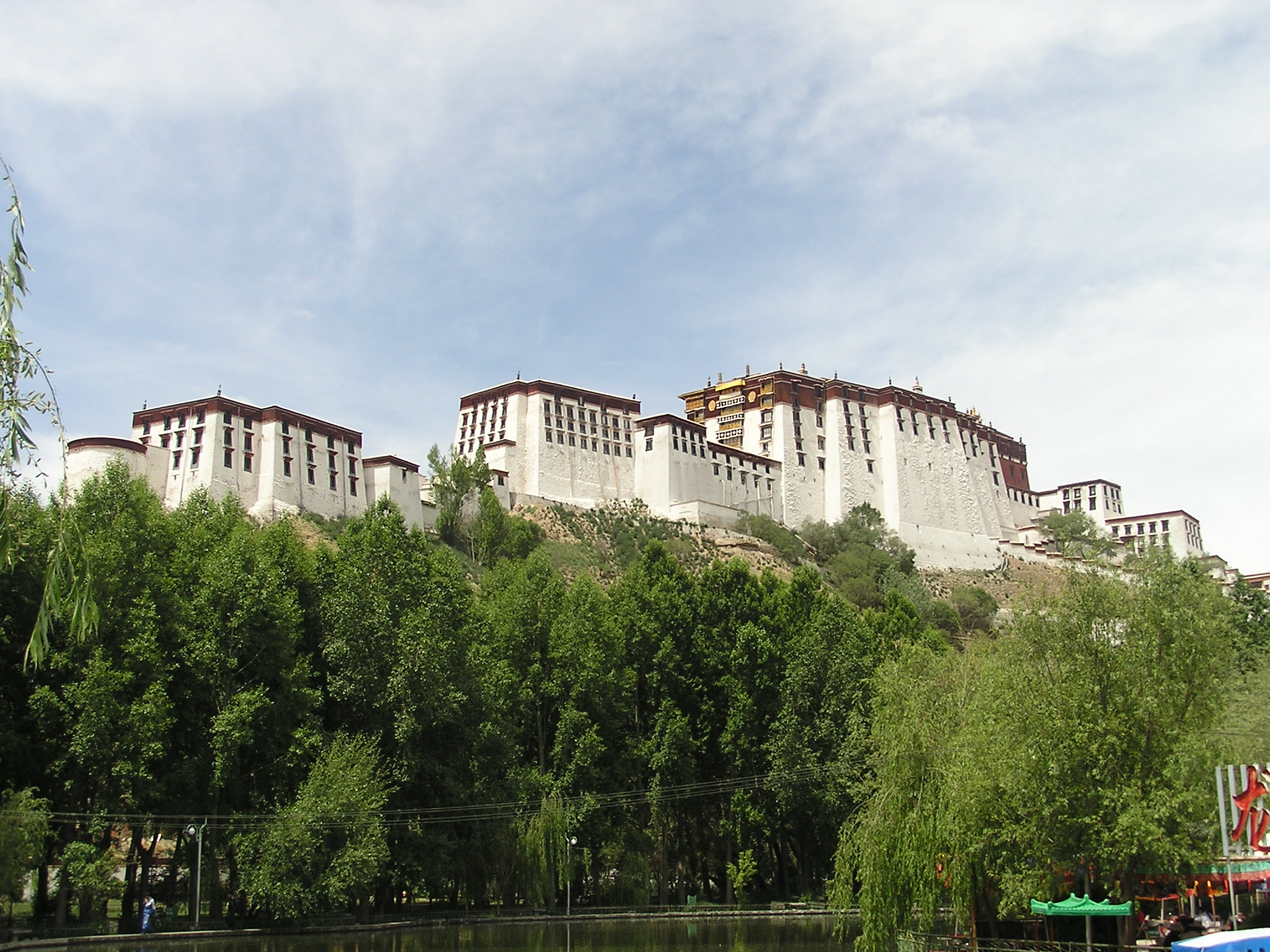 Lhukhang 8